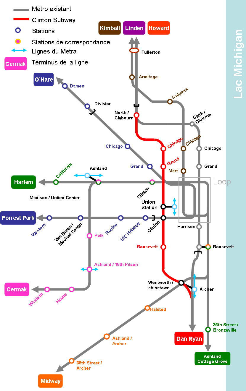 Plan du nouveau Tunnel Cliton pour le métro de Chicago